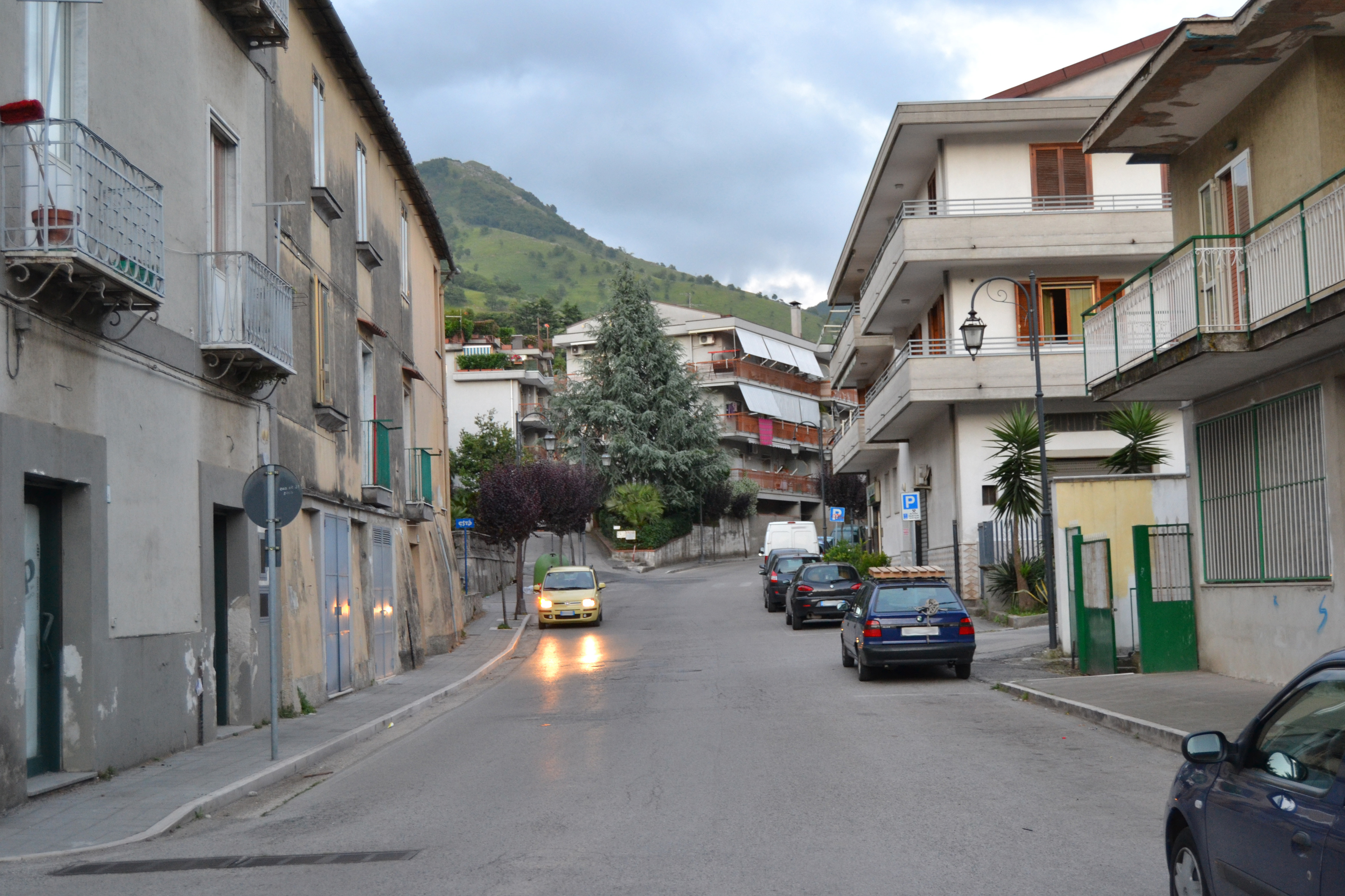 Sava, frazione di Baronissi (SA).